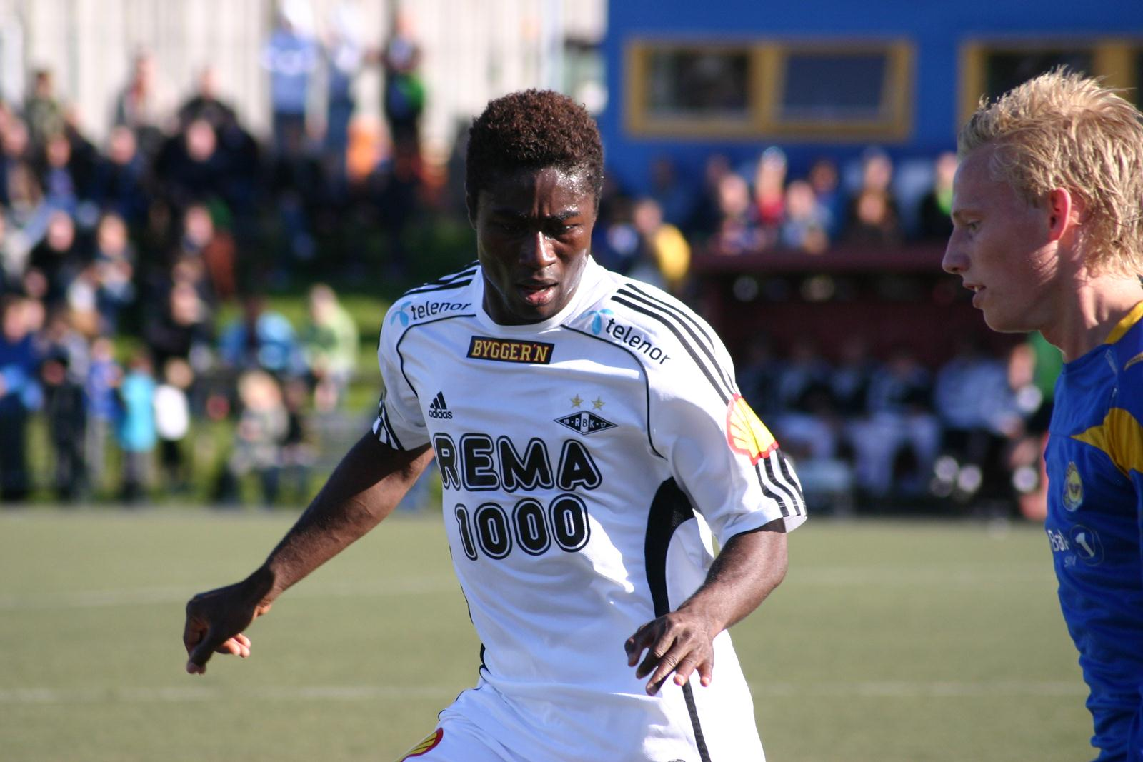 Bildet av Alexander Tettey i treningskamp mot STrindheim